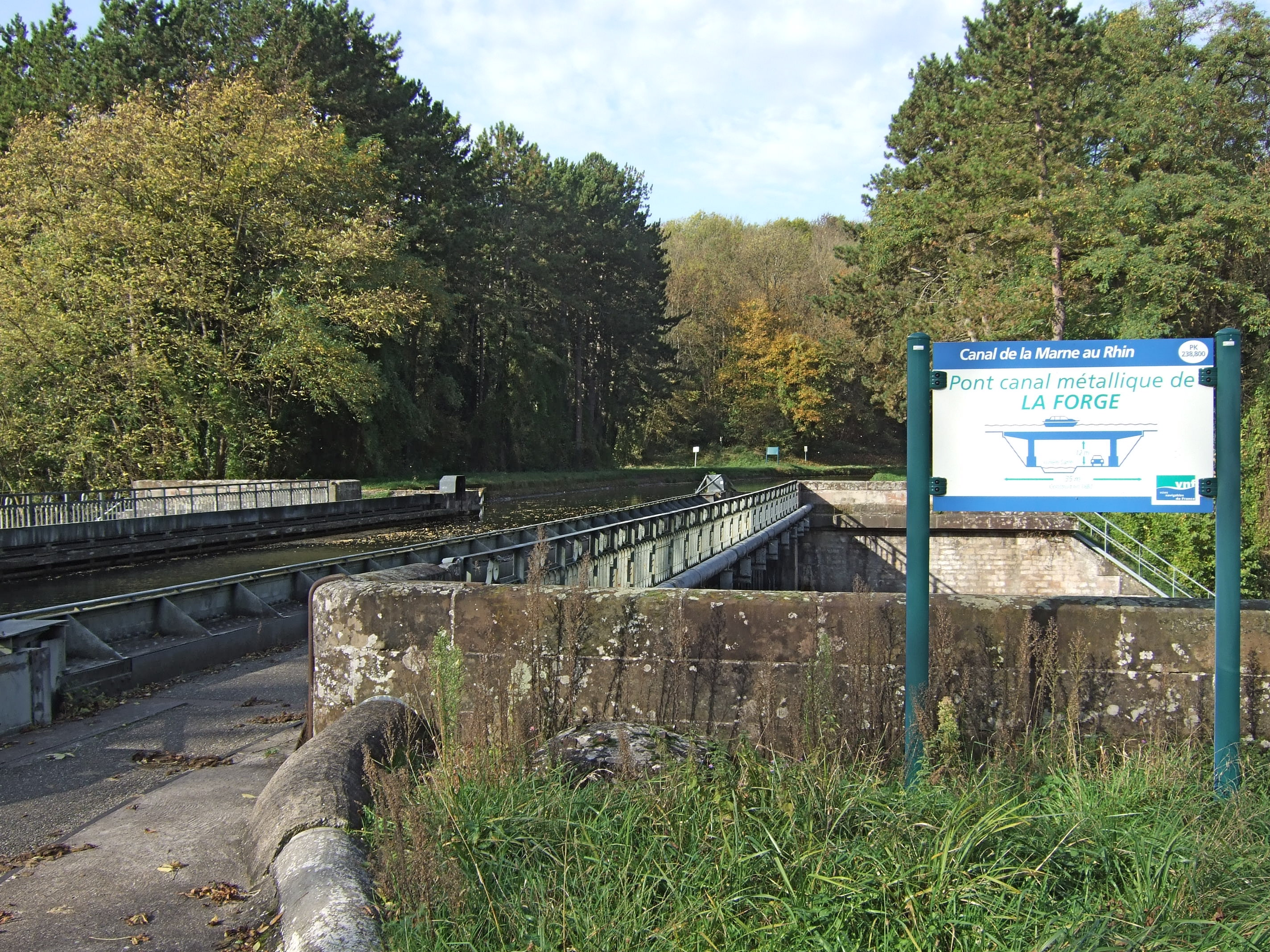 Pont-canal de La Forge près de Sarrebourg